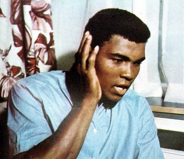 Cassius Clay, 1970 - El Grafico del 01 de Diciembre de 1970. Edicion 2669